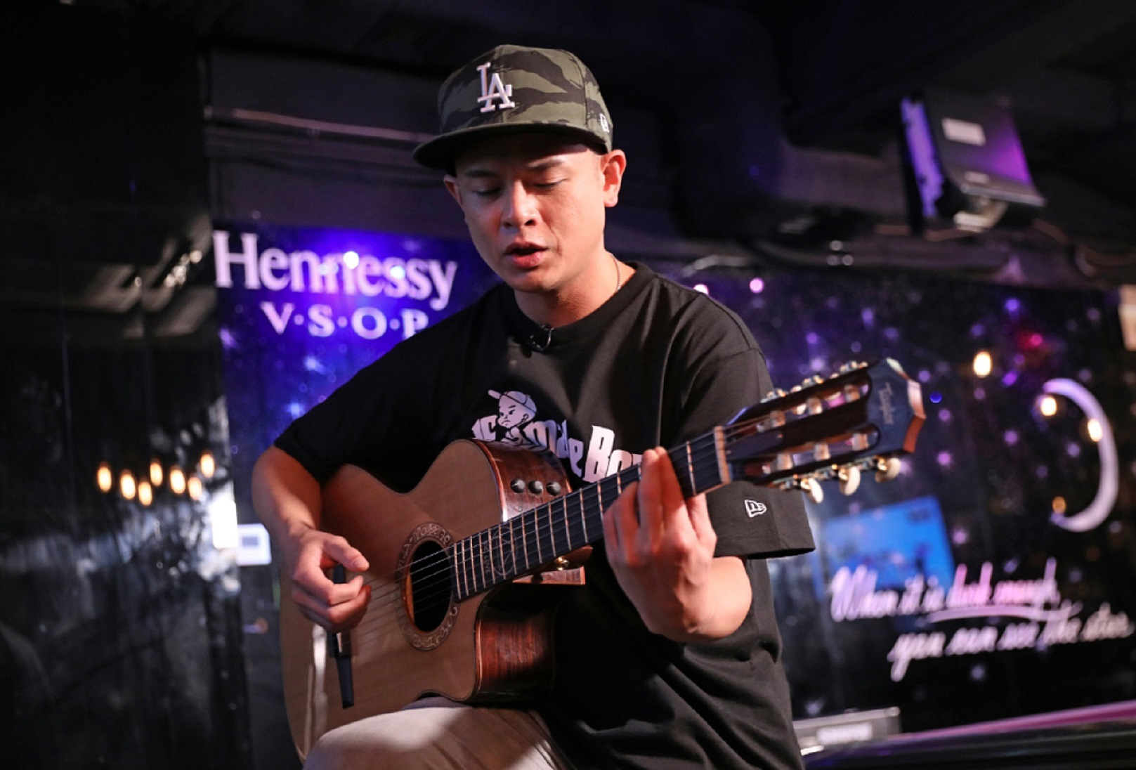 中文（香港）: 2009年IFPI香港唱片銷量大獎十大銷量本地歌手之一